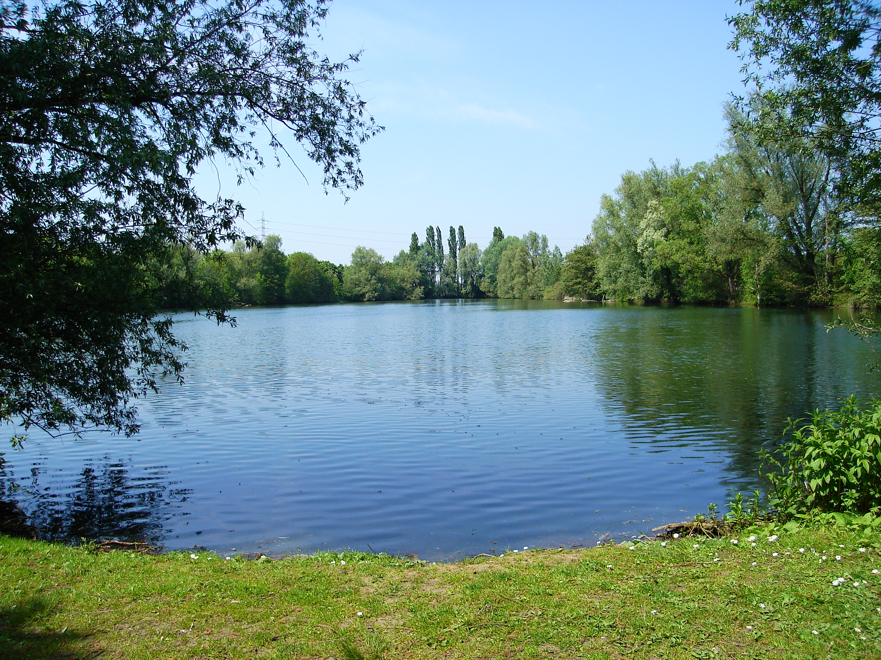 MUISBROEK